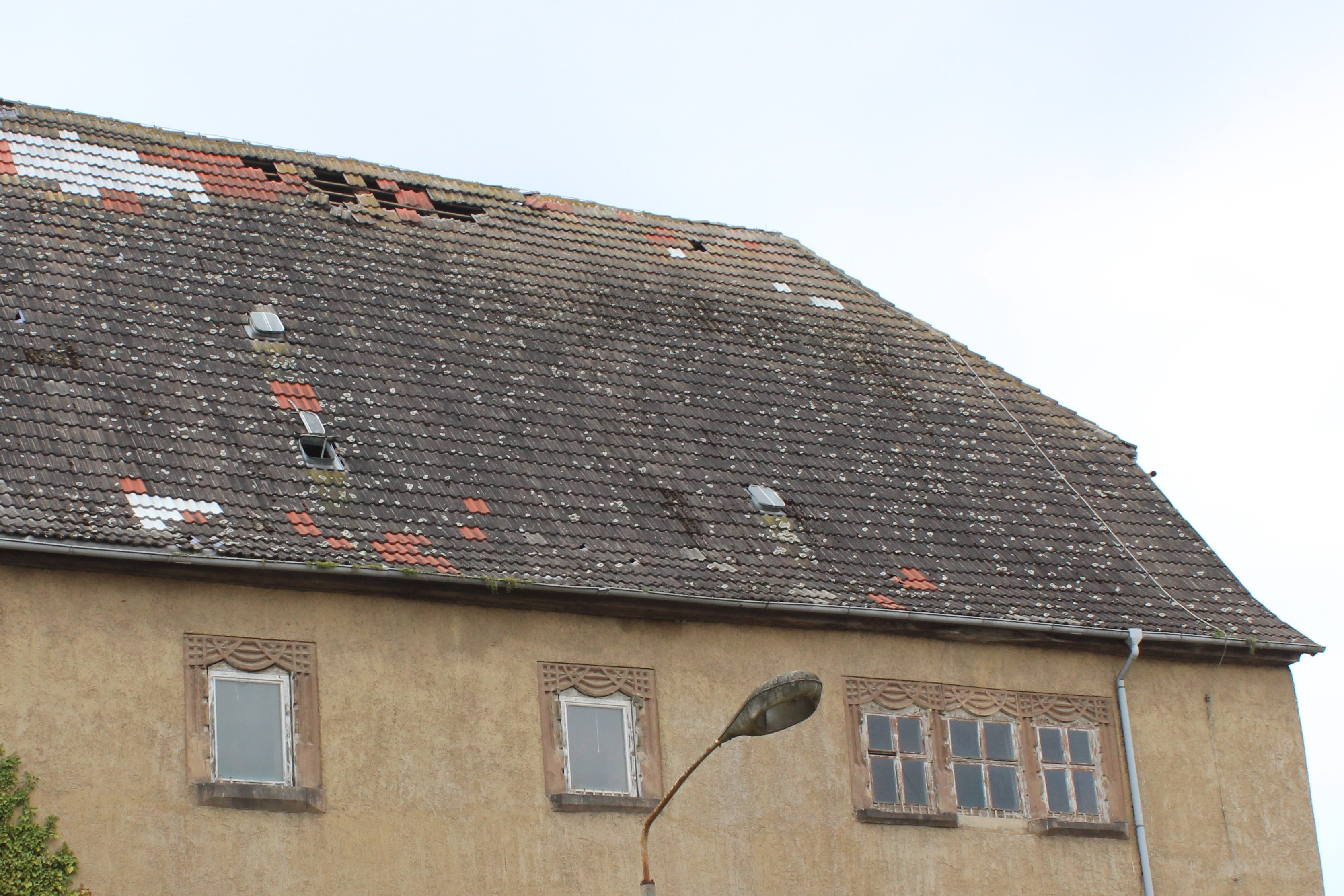 Schloss Tonna in Gräfentonna (auch "Kettenburg" genannt)